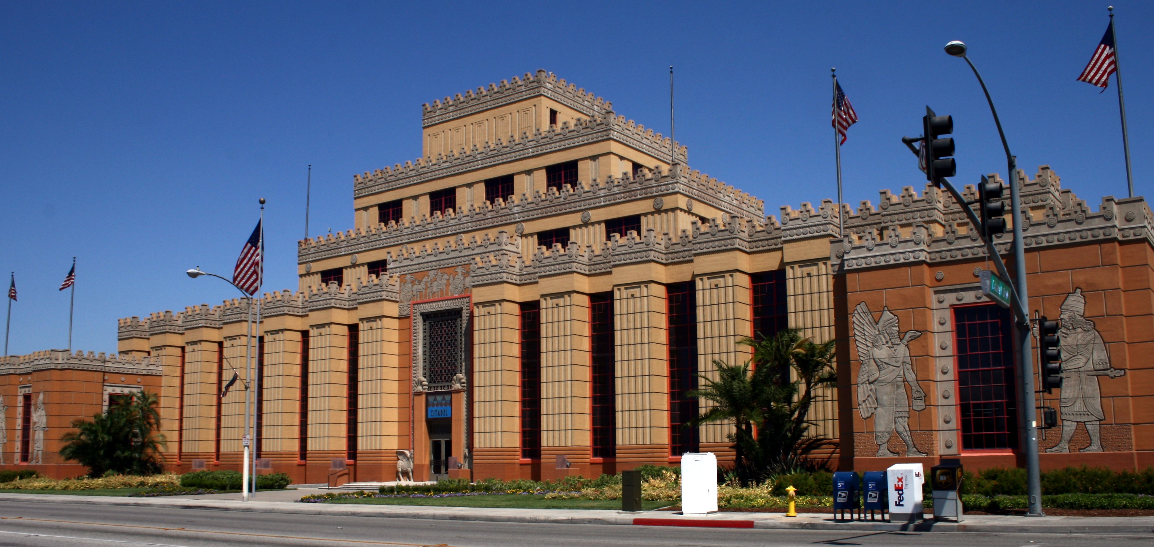 Los Angeles, California